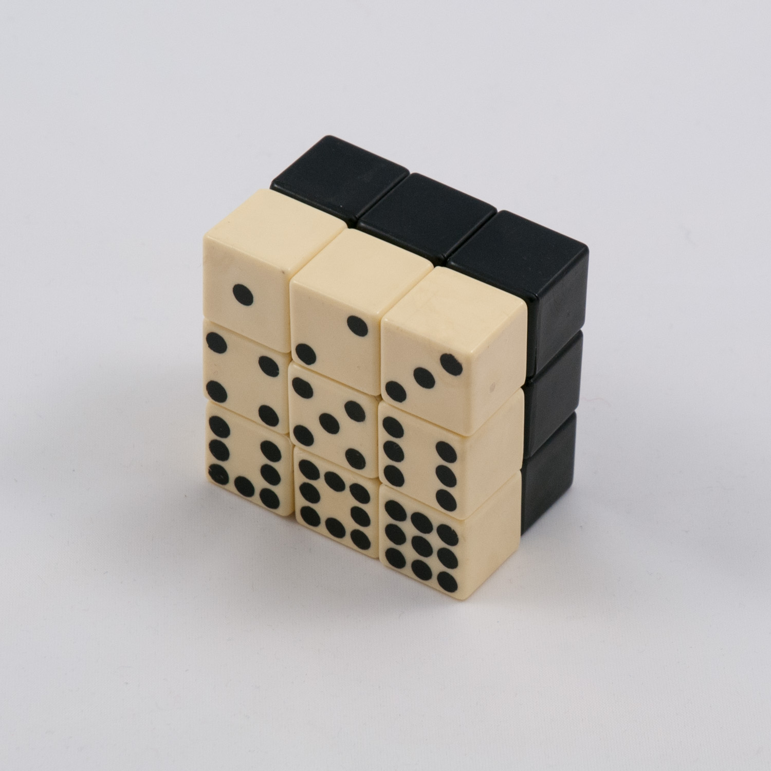 Groove Domino